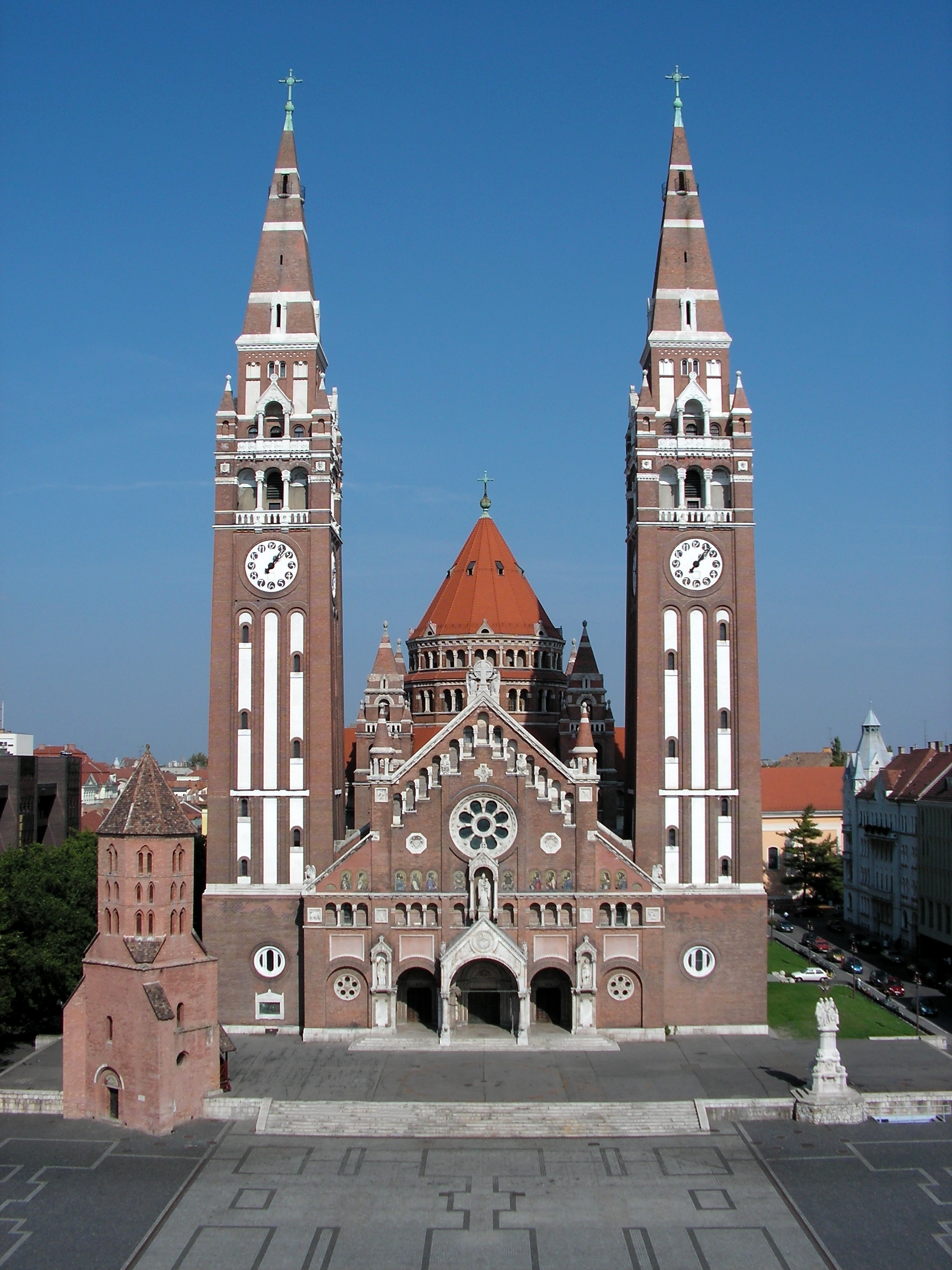 Fogadalmi templom (Szeged, Dóm tér) This is a photo of a monument in Hungary. Identifier: 12498